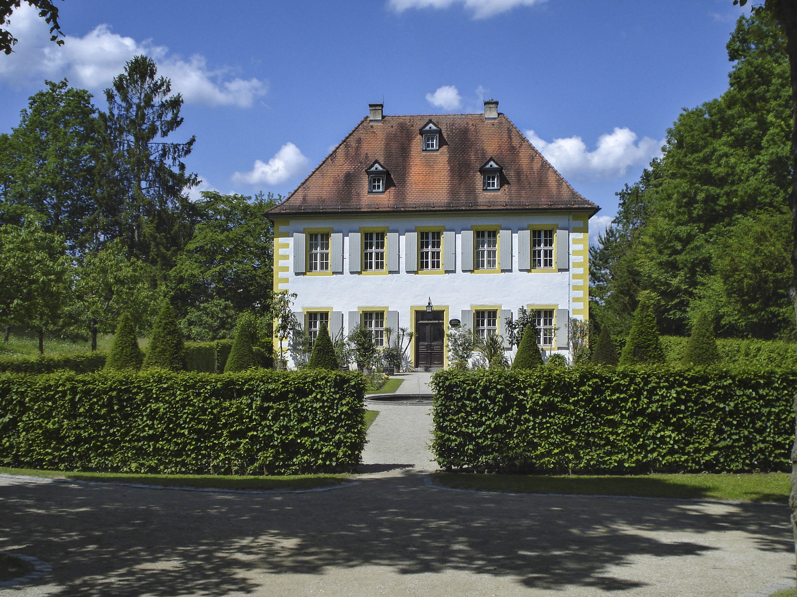 Schlösschen "Monplaisir", Eremitage, Bayreuth, Bayern, Deutschland